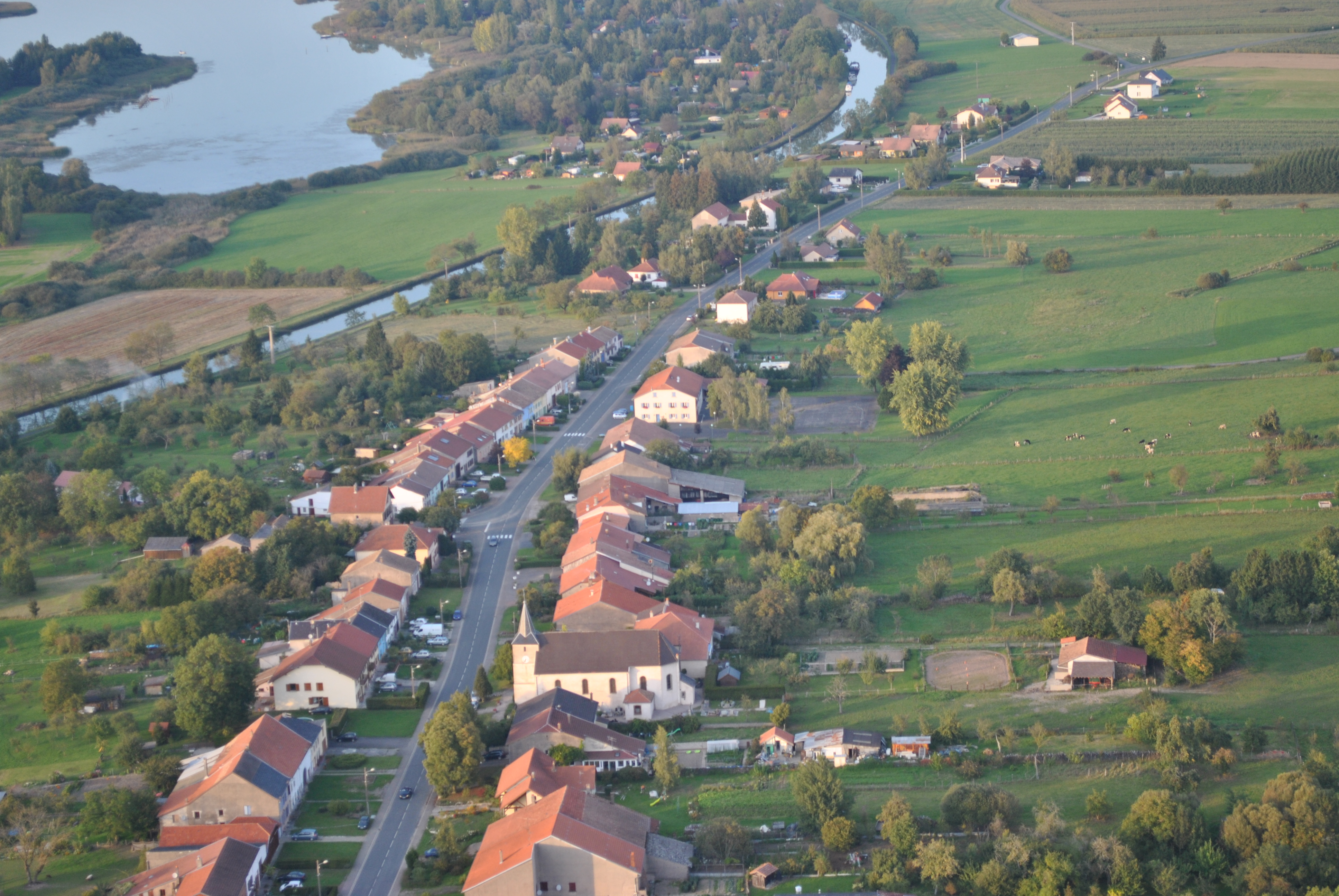 Photo aérienne de Diane Capelle